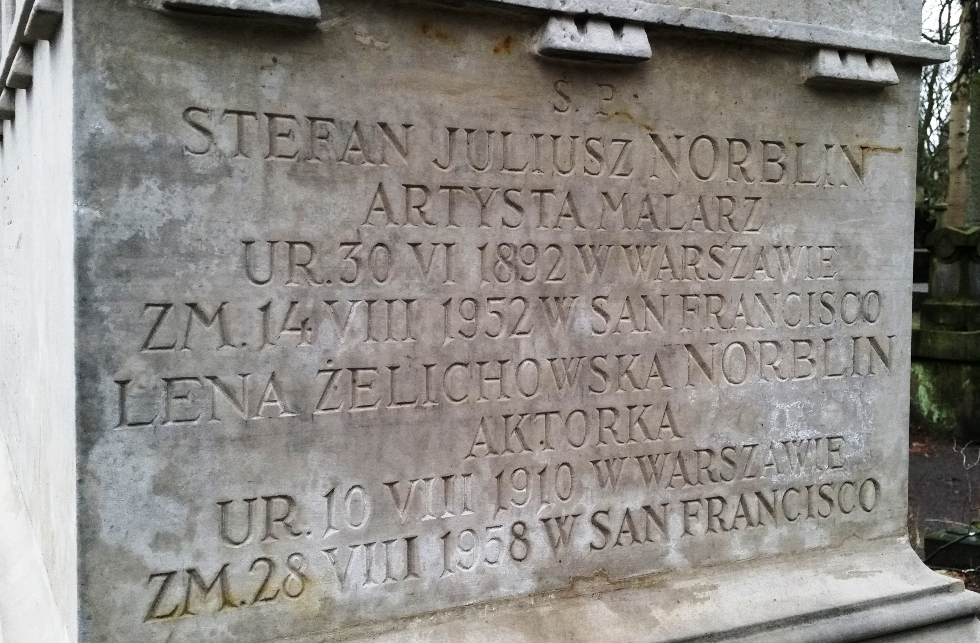 Grób aktorki Leny Żelichowskiej na cmentarzu Powązkowskim w Warszawie, kwatera F/G.